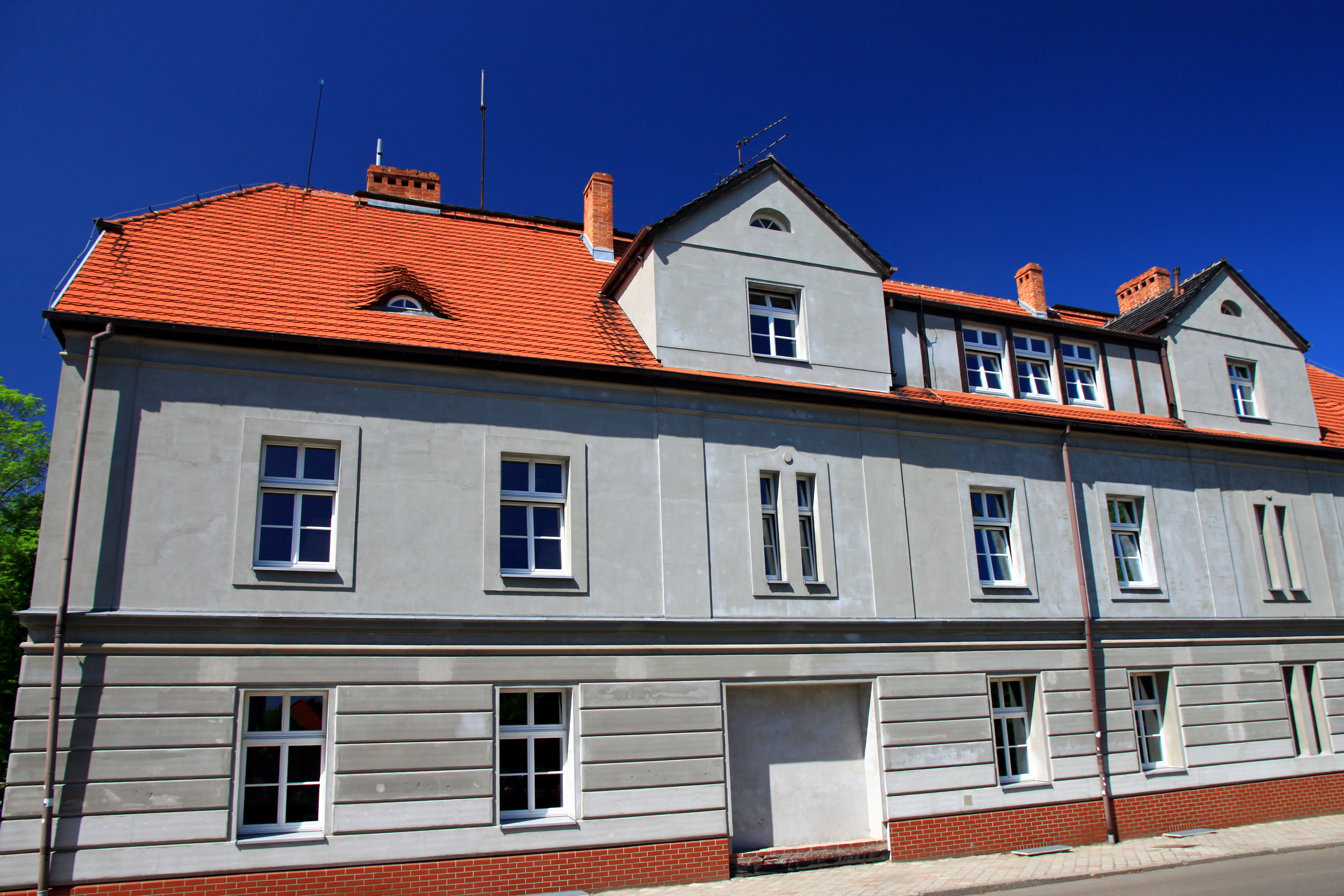 Przed wojną sanatorium dla chłopców funkcjonujące w ramach Zakładu Marii. W czasie okupacja hitlerowskiej siedziba szkoły samochodowej dla młodzieży z Hitlerjugend. W 1948 r. obiekt przejął Polski Czerwony Krzyż, nadając mu wspólną nazwę "Caritas" i uruchamiając prewentorium dla dzieci. W 1950 r. Dyrekcja Okręgowa PKP uruchomiła w budynku Kolejowe Sanatorium dla Dzieci. W latach 1971-2000 w budynku mieścił się szpital kolejowy. Następnie obiekt stał się własnością parafii NSPJ, która przeprowadziła jego gruntowny remont. Obecnie obiekt niezagospodarowany.